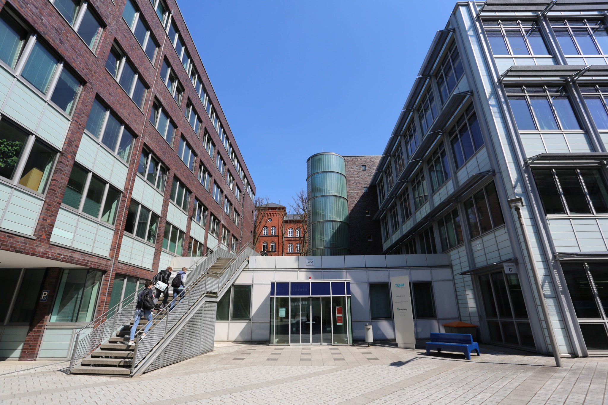 TUHH Gebäude C und D.